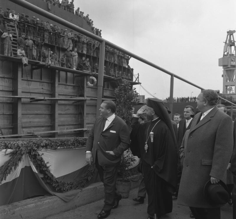 Staatsbesuch Zypern Besuch der Schlieker Werft Hamburg